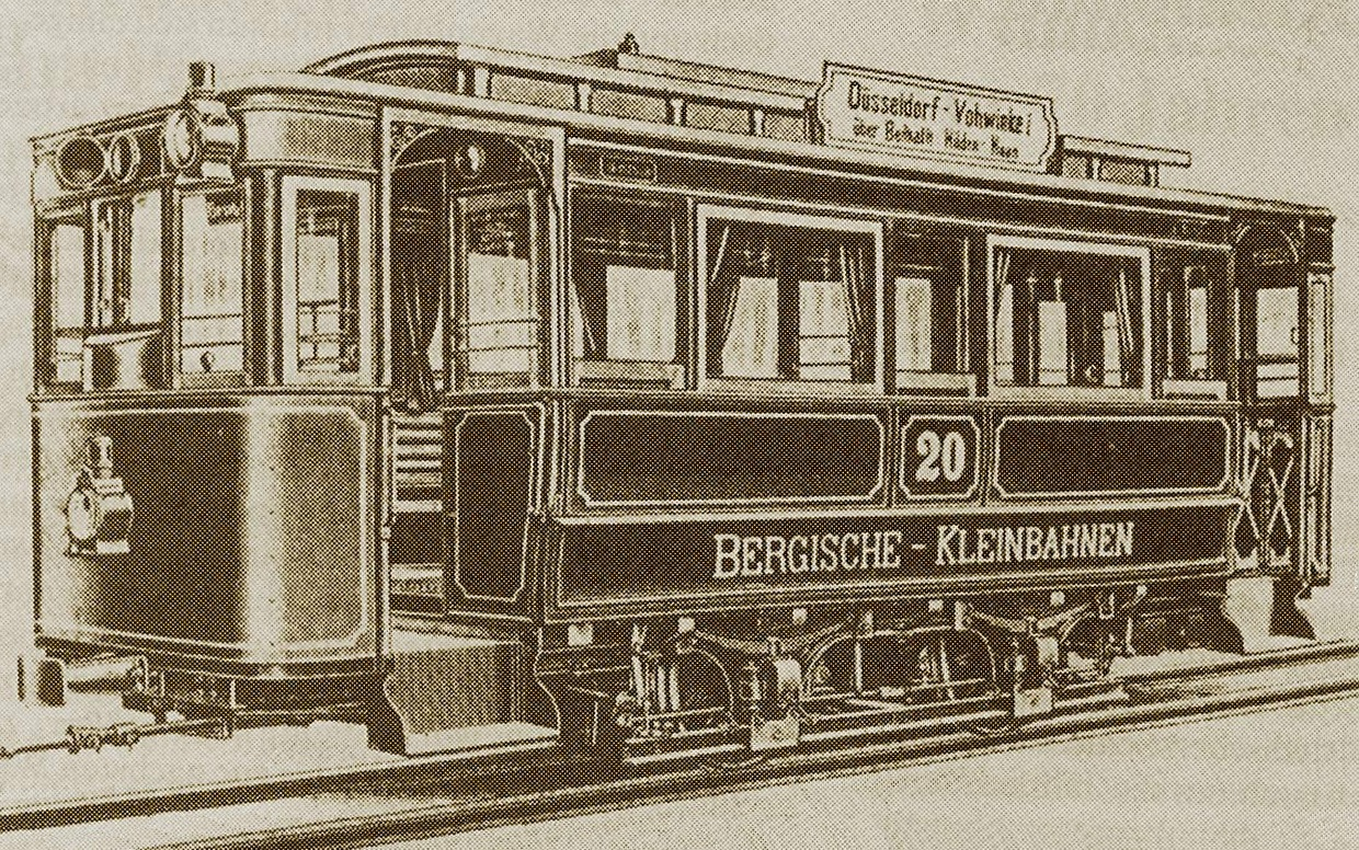 Tram in Benrath in 1900 Linie V Düsseldorf - Benrath - Hilden - Haan - Vohwinkel